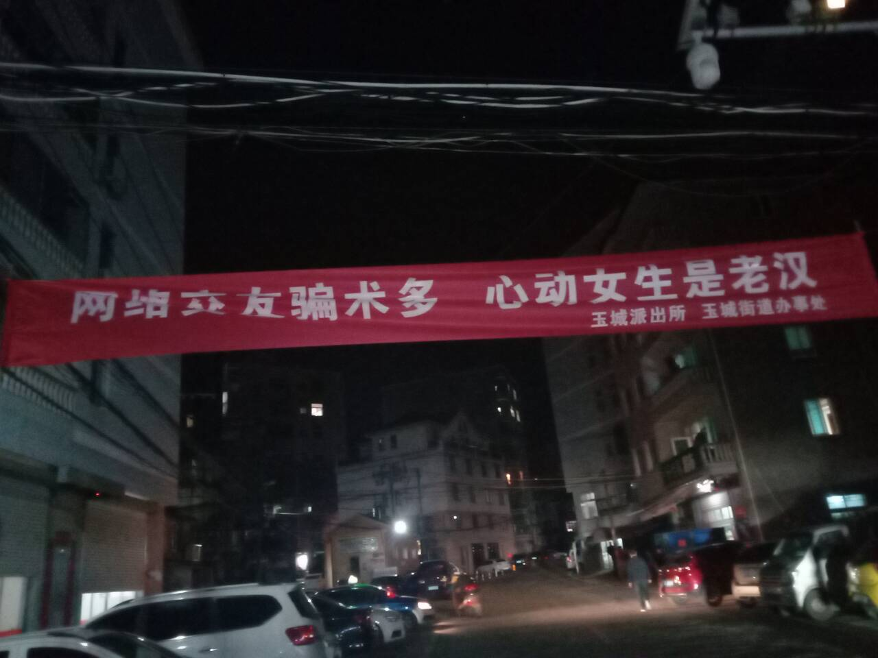 中文（中国大陆）: 中国浙江省玉环市玉城街道上空悬挂的横幅：网络交友骗术多，心动女生是老汉